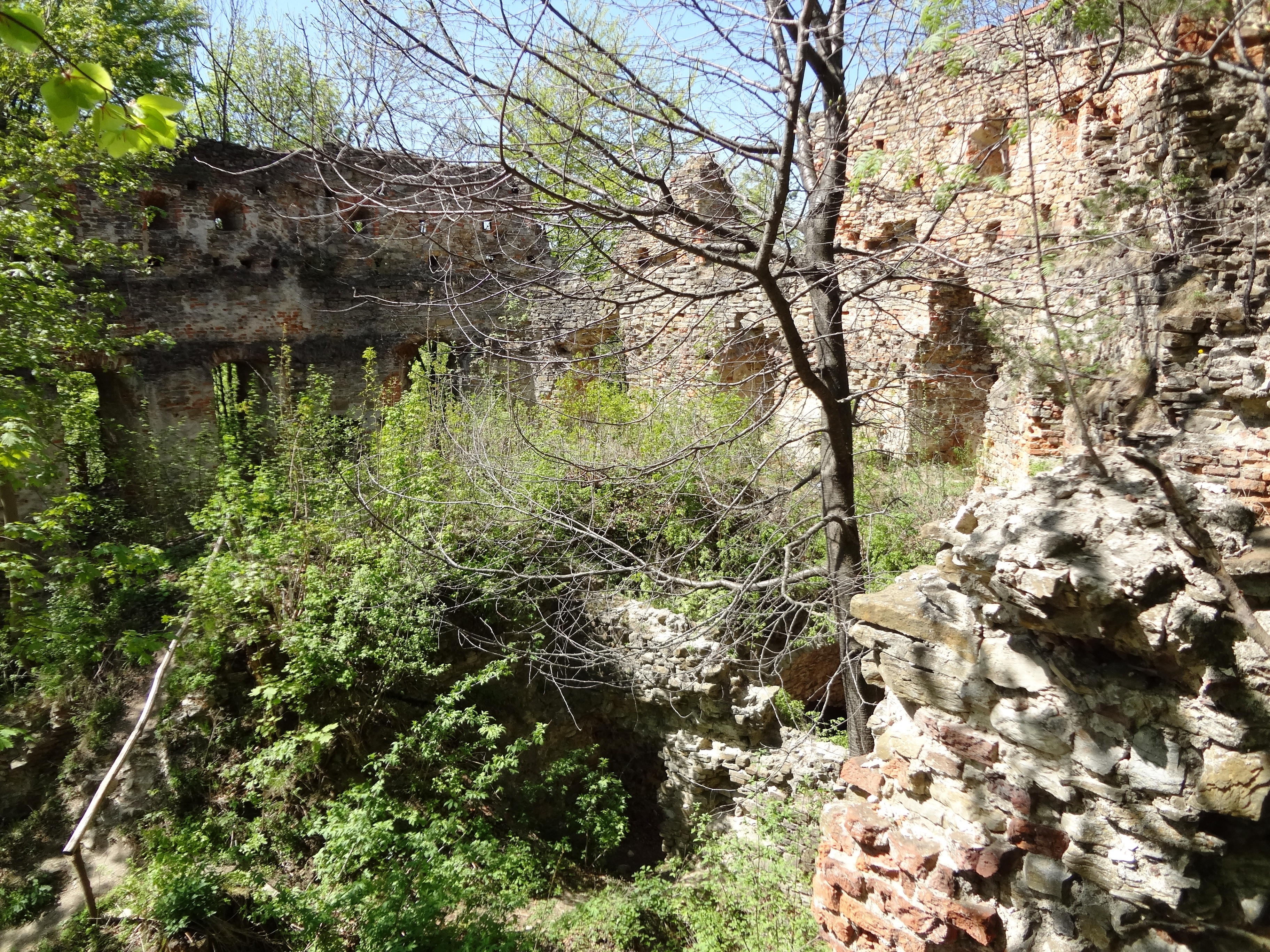 Замок (мур.), Добромиль, поблизу с. Тернава